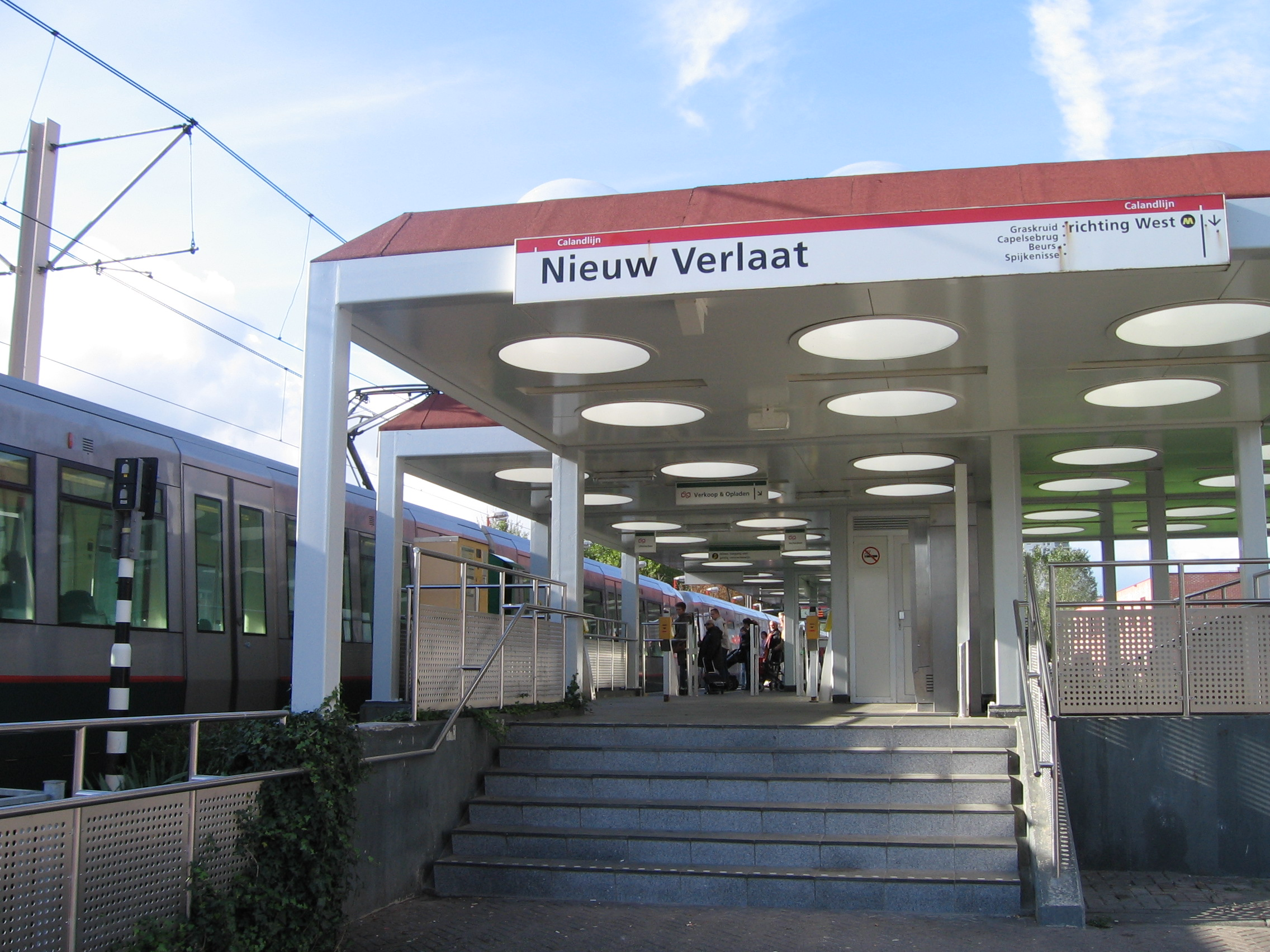 Ingang metrostation Nieuwe Verlaat voor metro richting west.